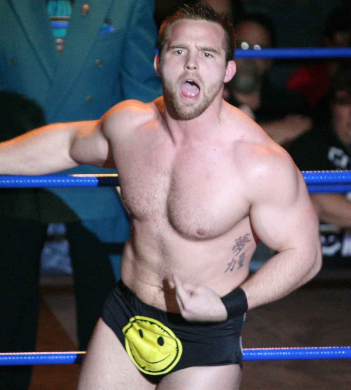 Steven "The Fever" Walters